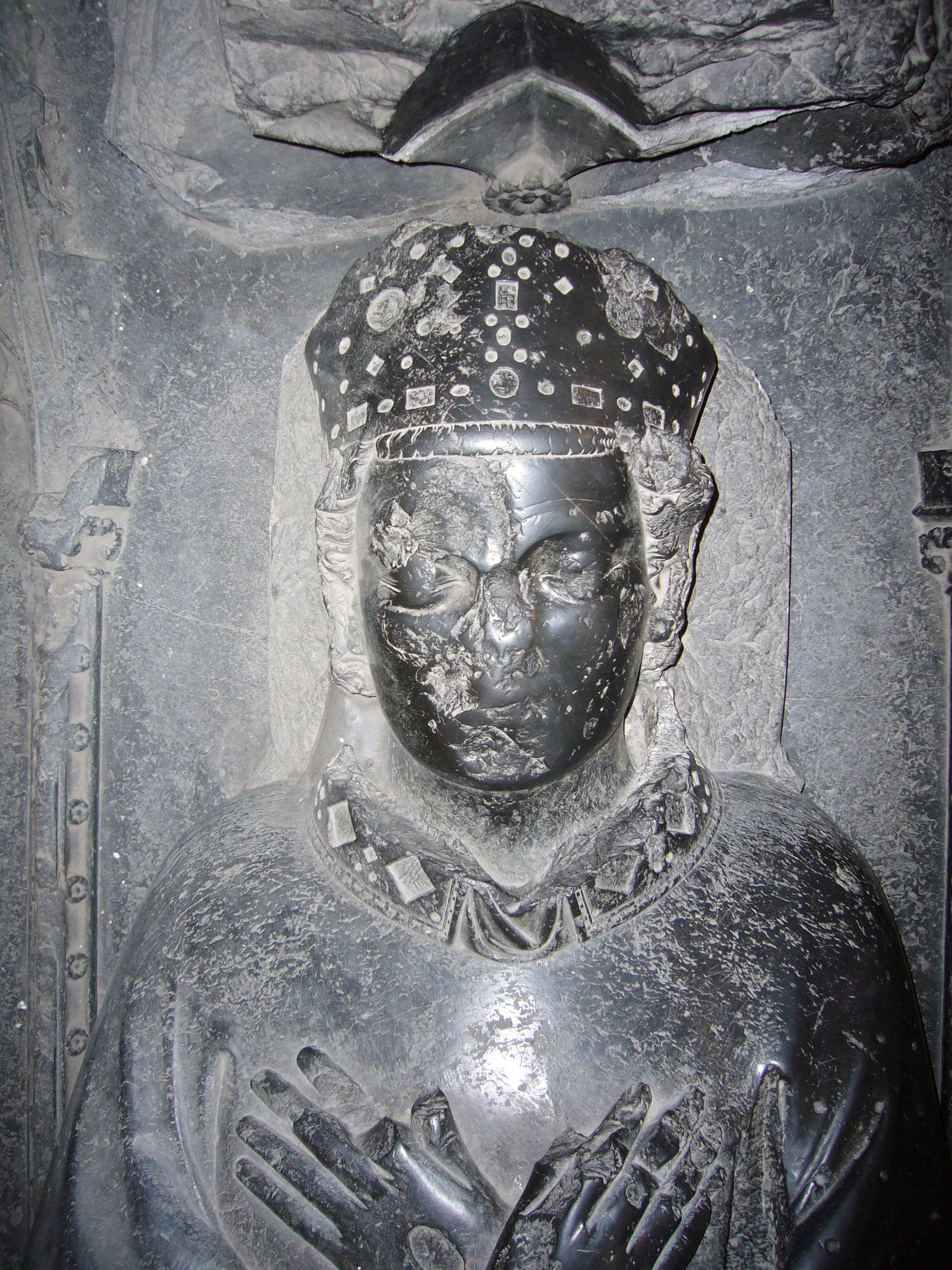 Tombe Guy van Avesnes, Domkerk Utrecht